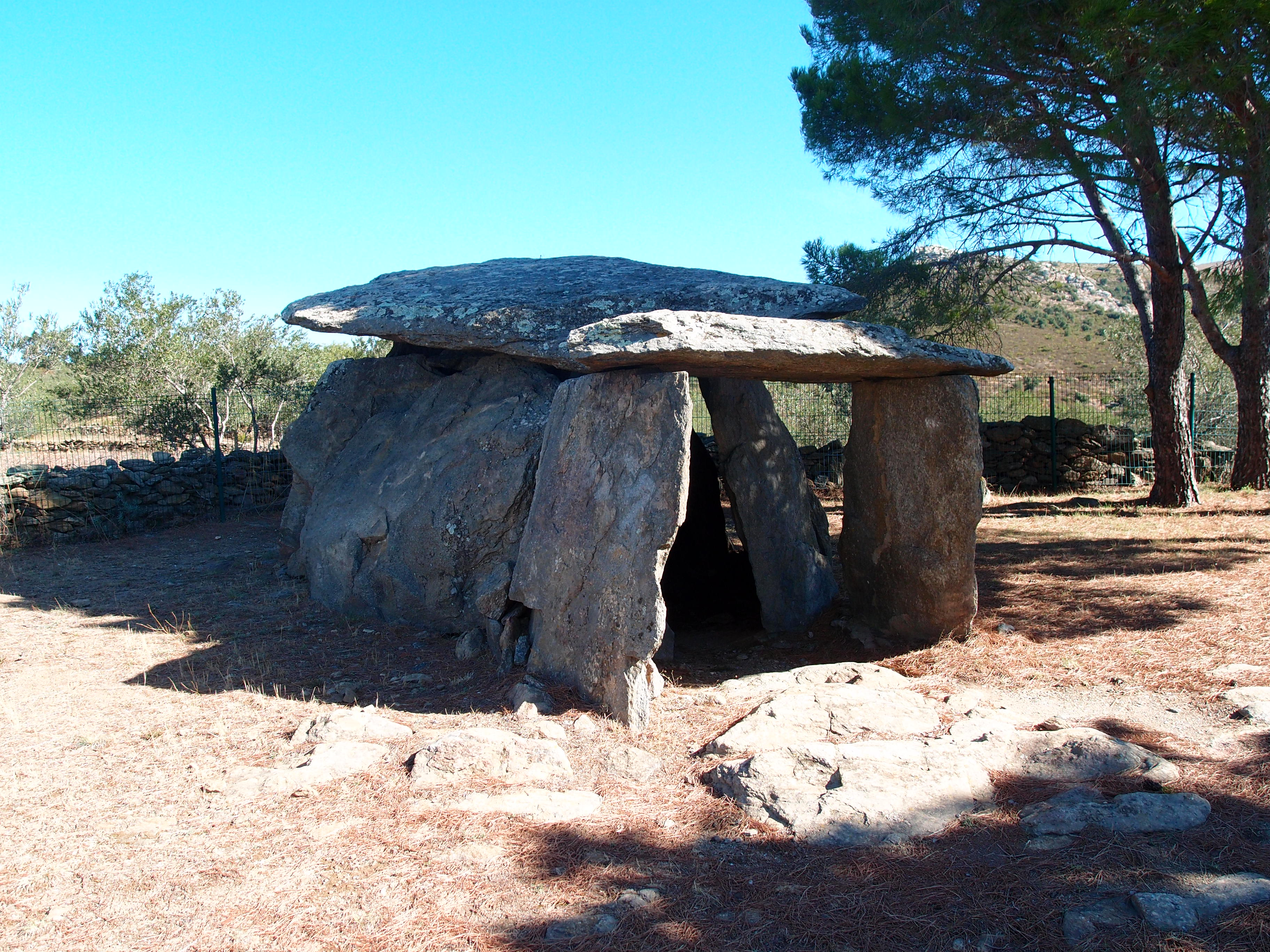 Dolmen de la Creu d’en Cobertella in Roses (Spanien/Katalonien) Datum: 14.09.2012 Urheber: M. Pfeiffer alias Benutzer:Gordito1869 Quelle: privates Fotoarchiv des Urhebers